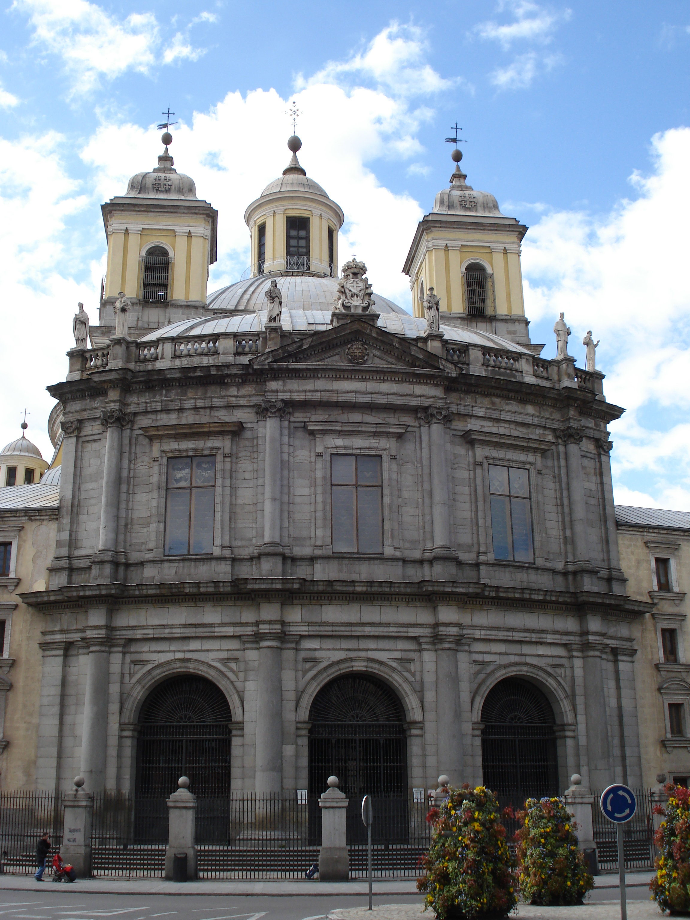 Fachada principal Iglesia San Francisco el Grande. Madrid